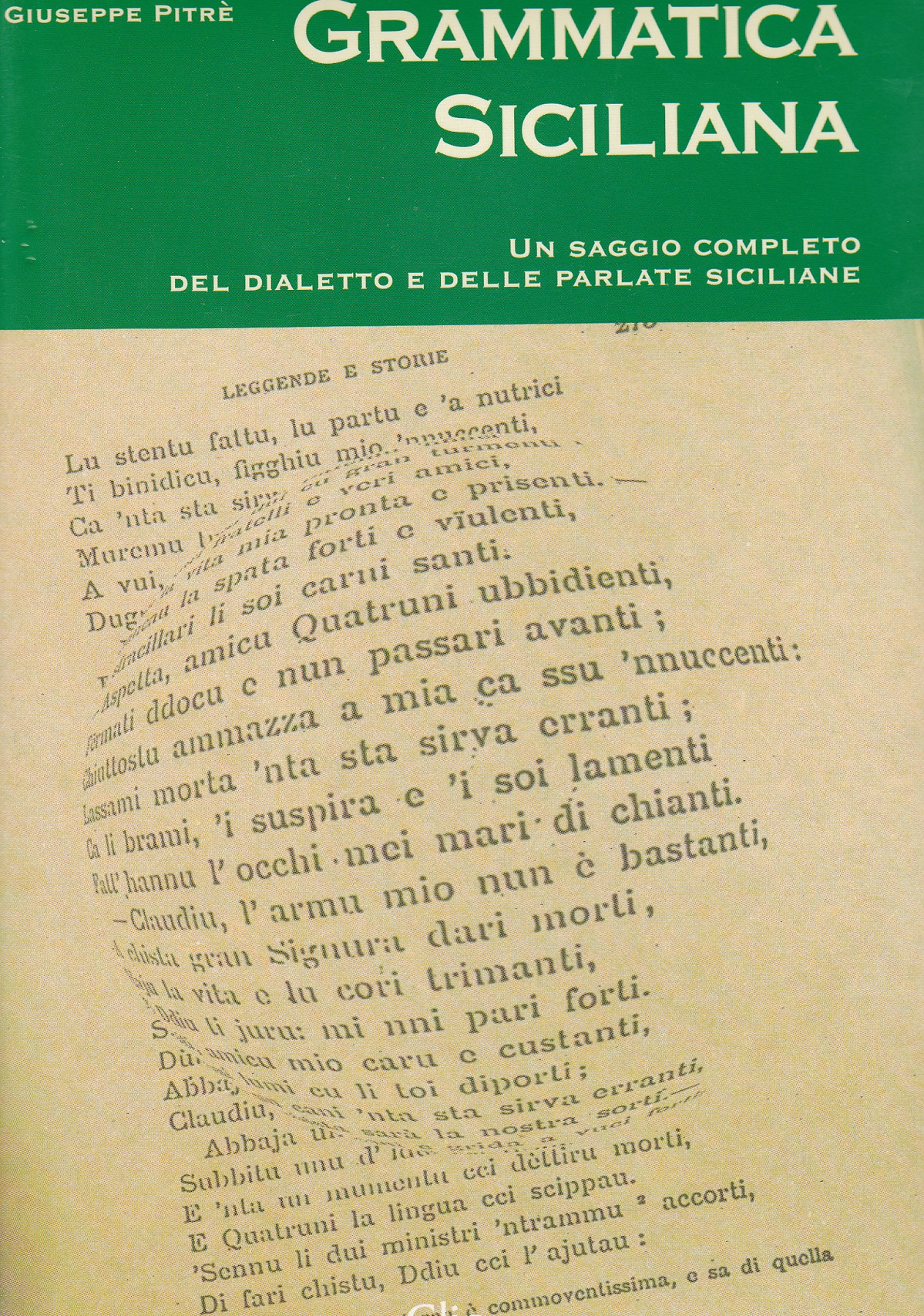 Sicilianu: Cupirtina dâ Grammatica Siciliana